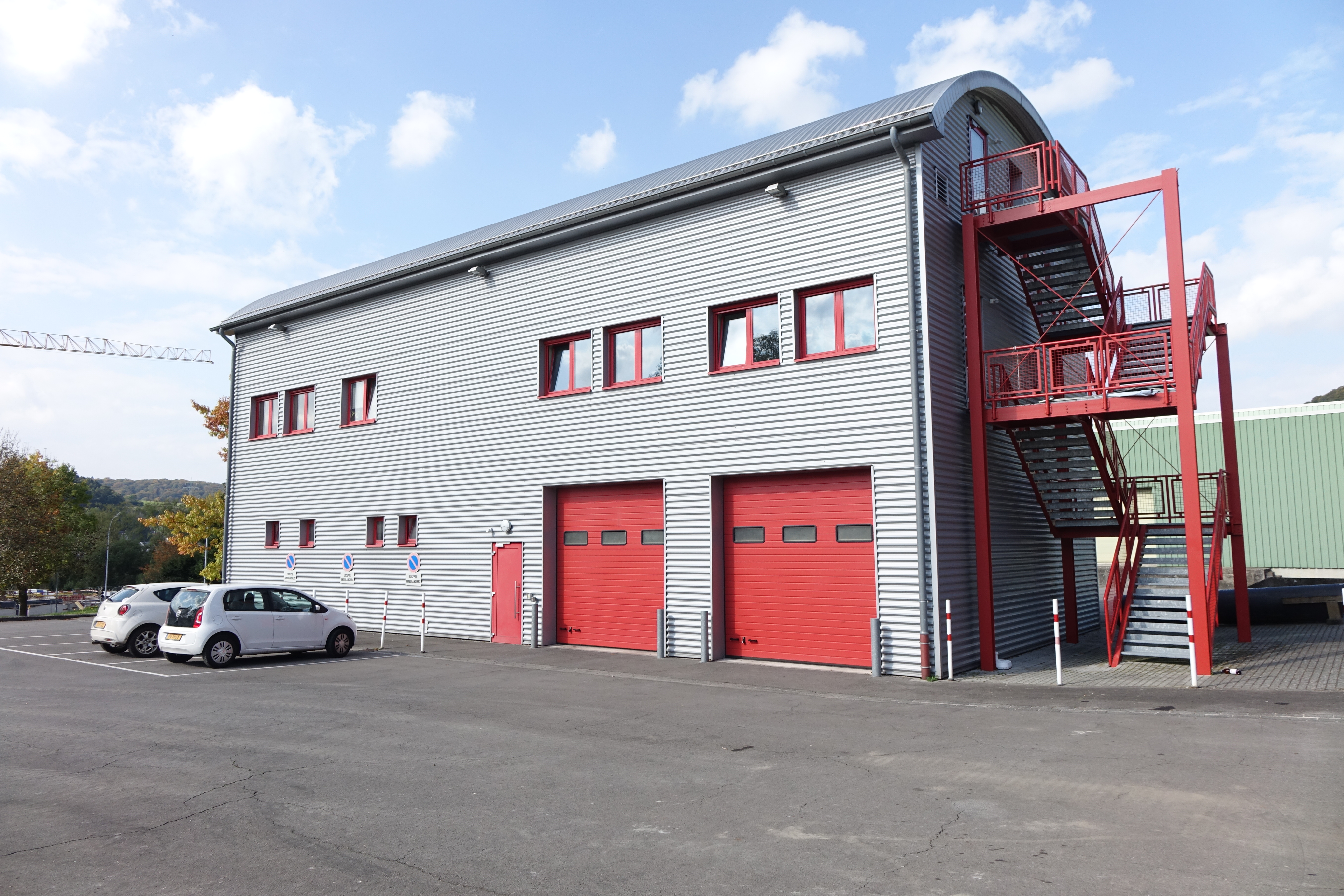 Protection Civile Lintgen, Luxembourg, October 1, 2014